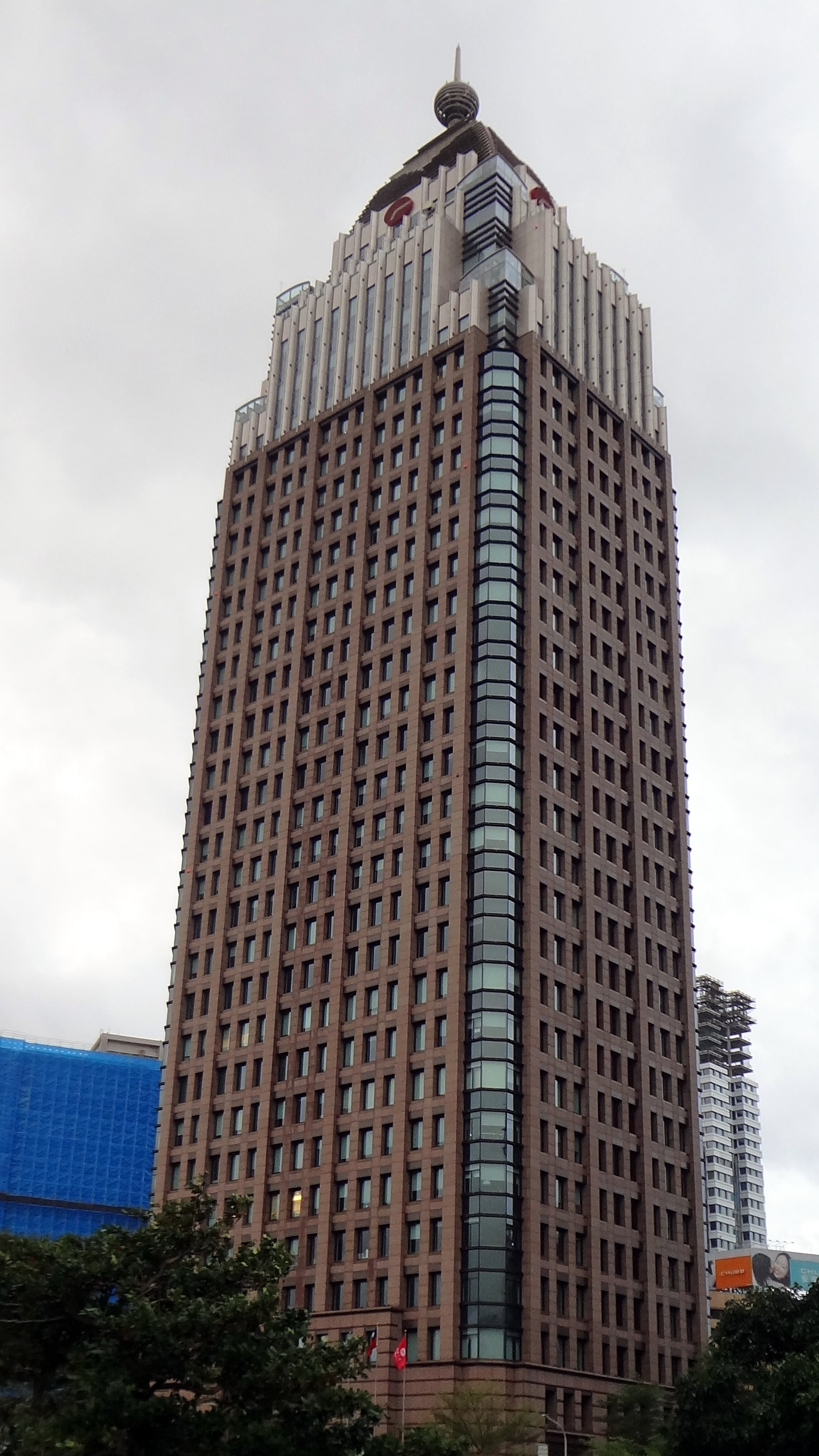 遠雄金融中心，位於臺北市信義區松高路1號。